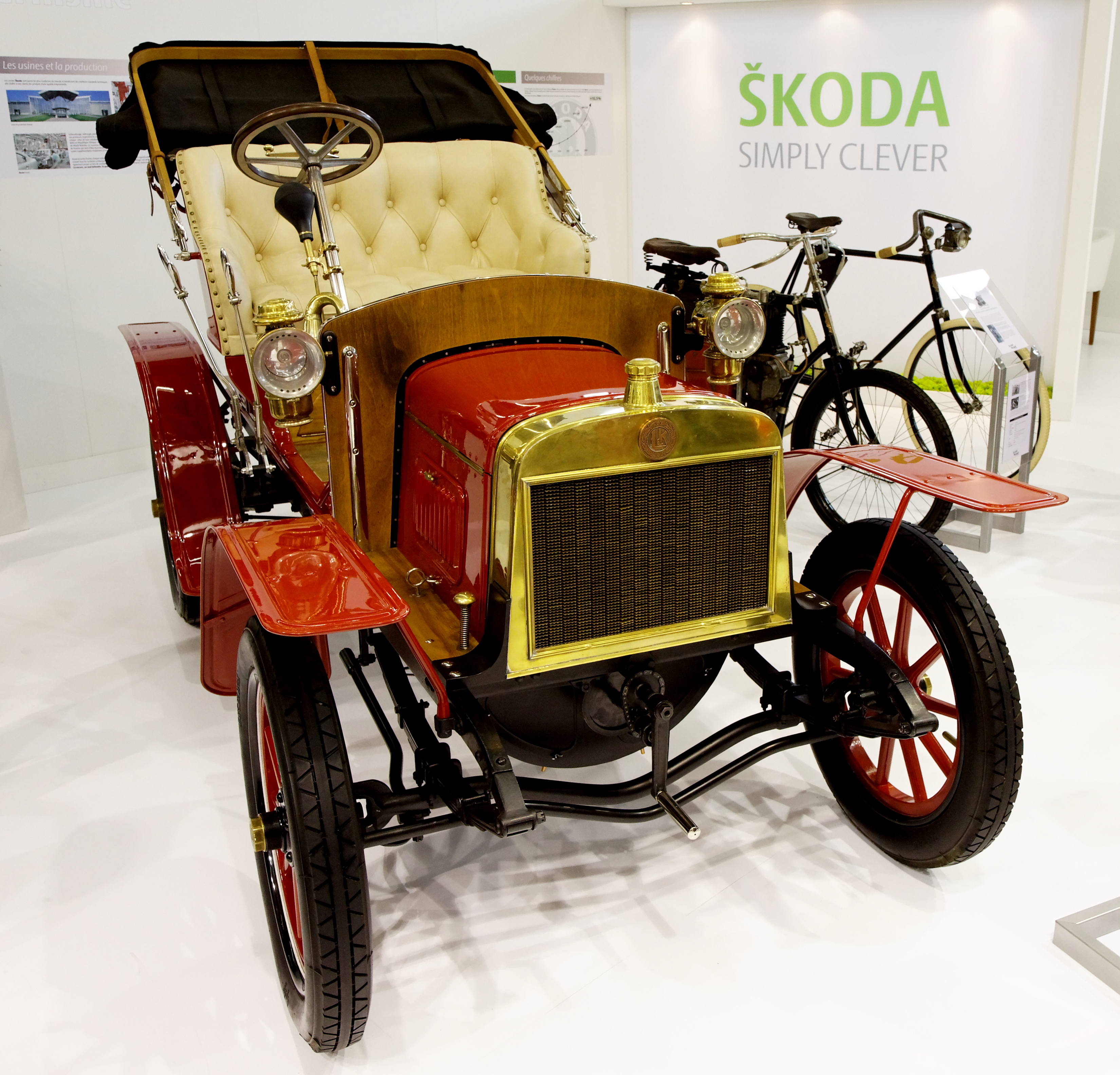 Photographie prise lors du salon rétromobile 2011 à Paris, porte de Versailles.